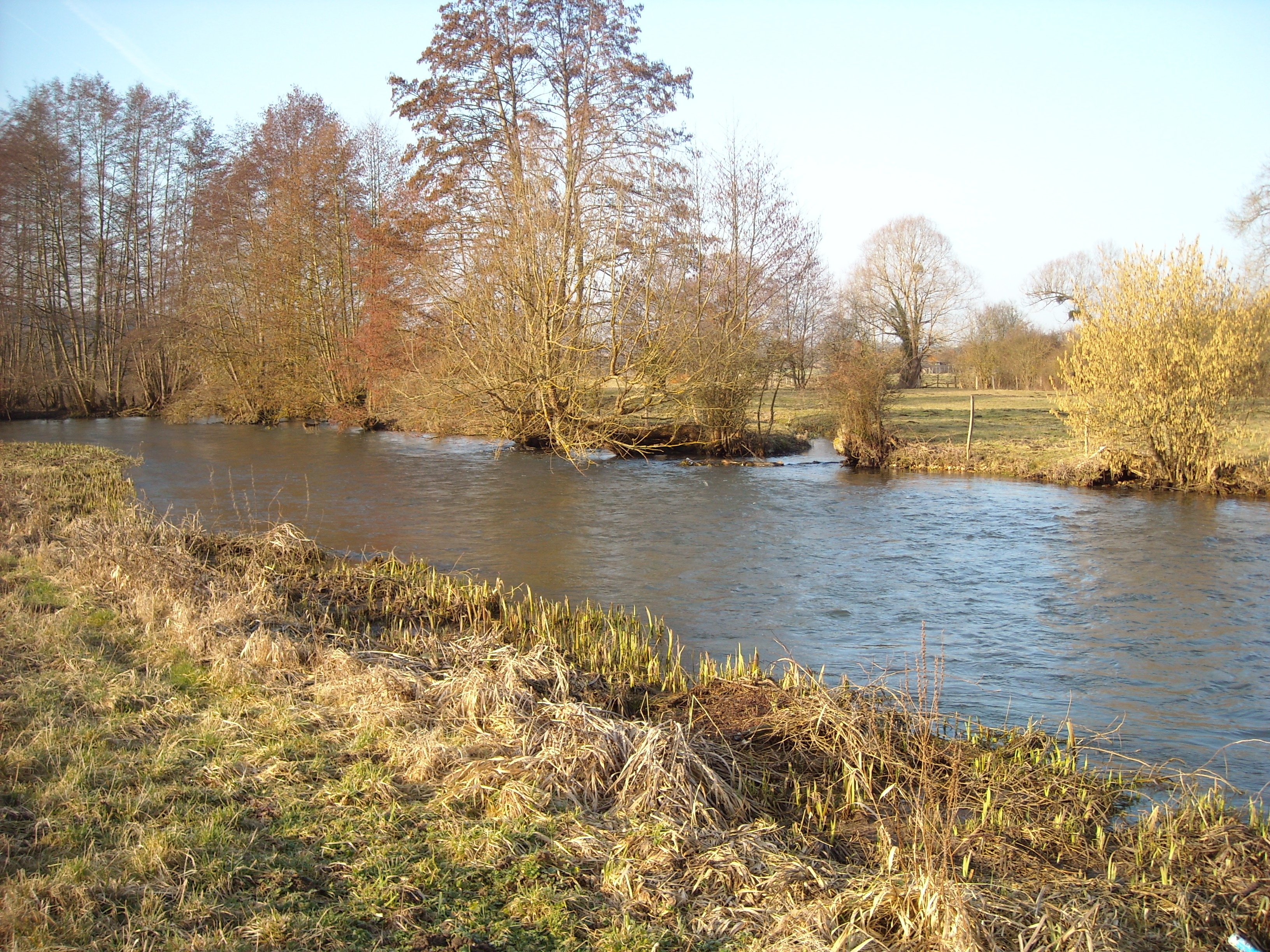 Rivière l' avre à Muzy